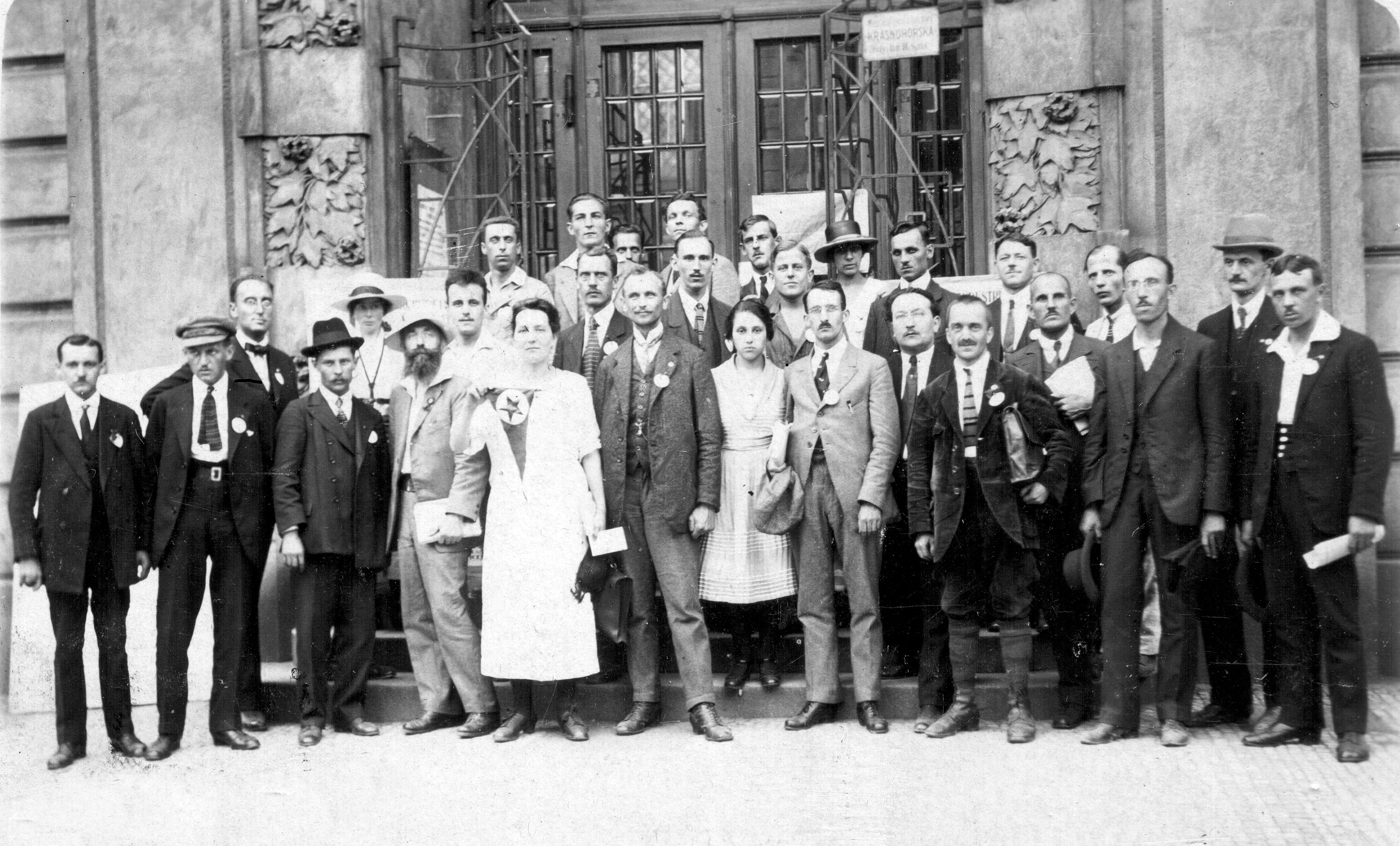 Foto de la fondokongreso de SAT, Prago, 1921.